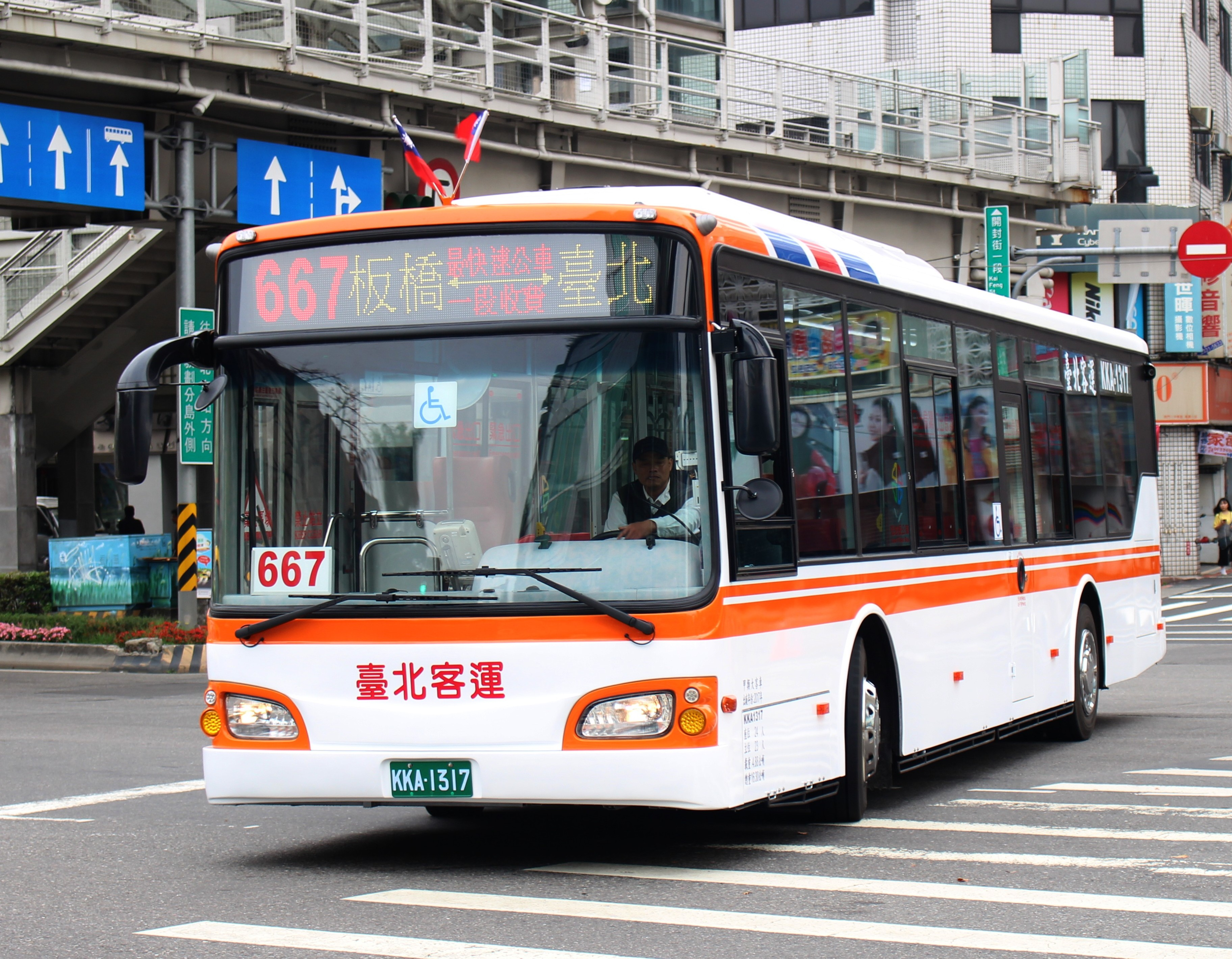 台北客運日野HS8JRVL-UTF低地板大客車KKA-1317 車頭安裝全彩顯示器